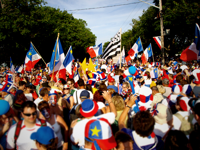 La fête acadienne du 15 Août 2009 à Caraquet, avec drapeau acadiens visibles. Un Gwenn ha Du est aussi visible au milieu.